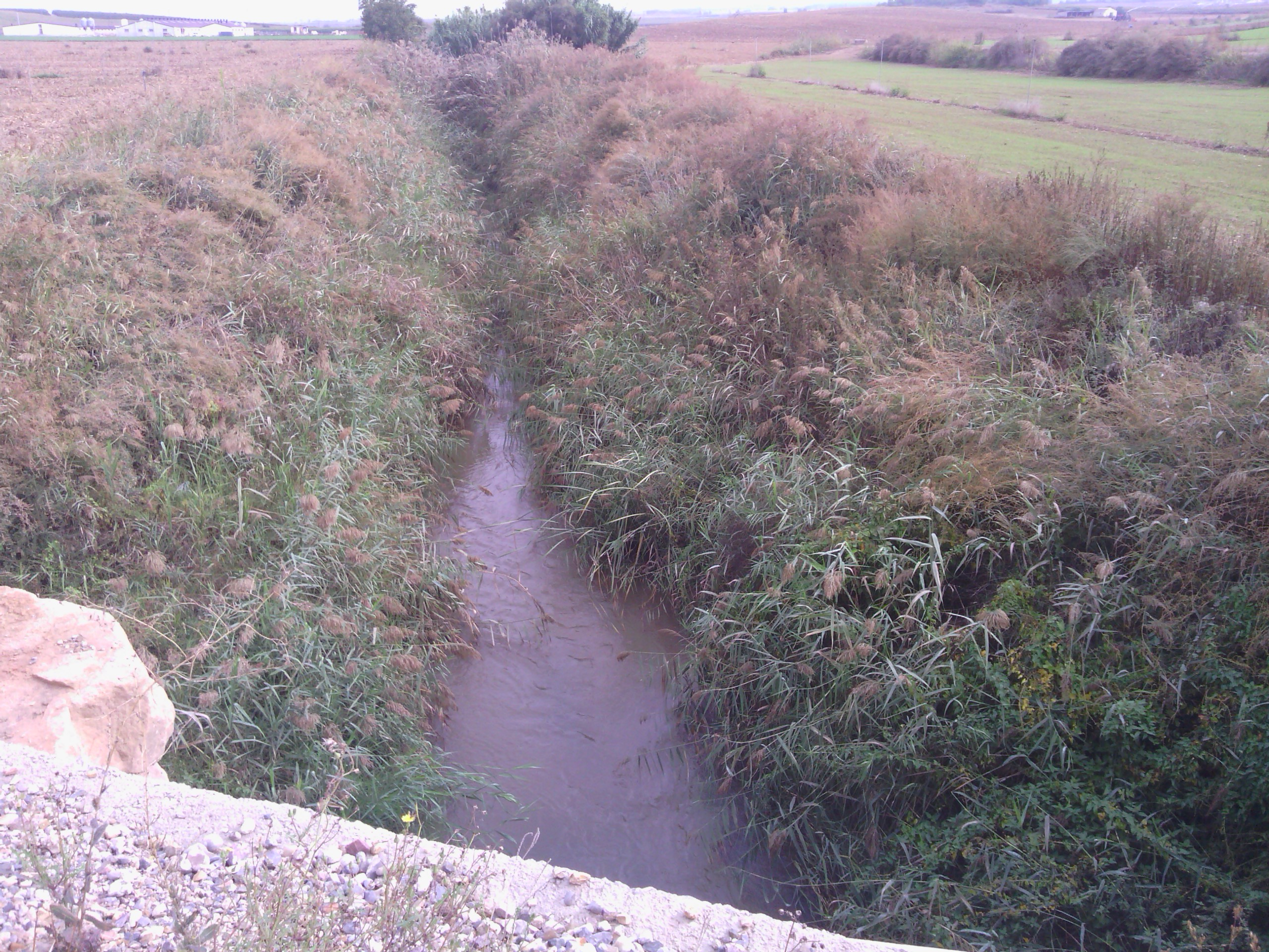 Clamor d'Almacelles localment coneguda com Clamor Amarga vista des del pont de la crta. Sucs a les Granges de Sant Josep a les proximitats del límit de província Lleida - Osca, mirant aprox. cap al Nord.